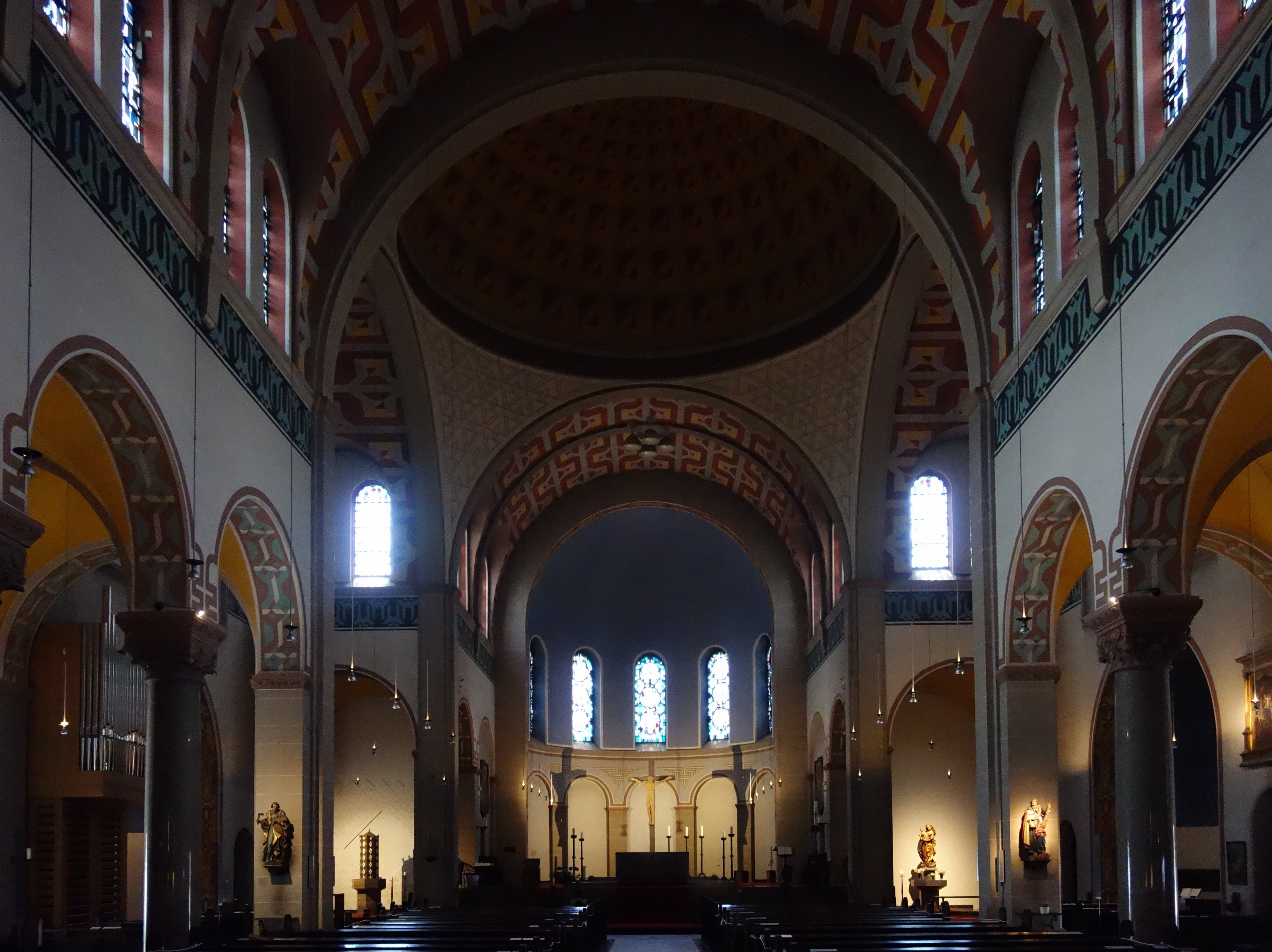 Innenraum der neuromanischen Kirche St. Antonius an der Luegallee in Düsseldorf-Oberkassel